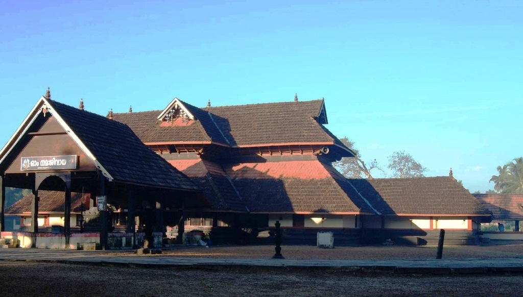 മാന്നാർ തൃക്കുരട്ടി മഹാദേവക്ഷേത്രം - കിഴക്കേ അമ്പലവട്ടം, മാന്നാർ, മാവേലിക്കര